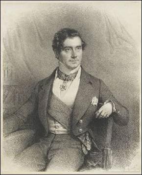 Sylvain Van de Weyer, Premier ministre belge